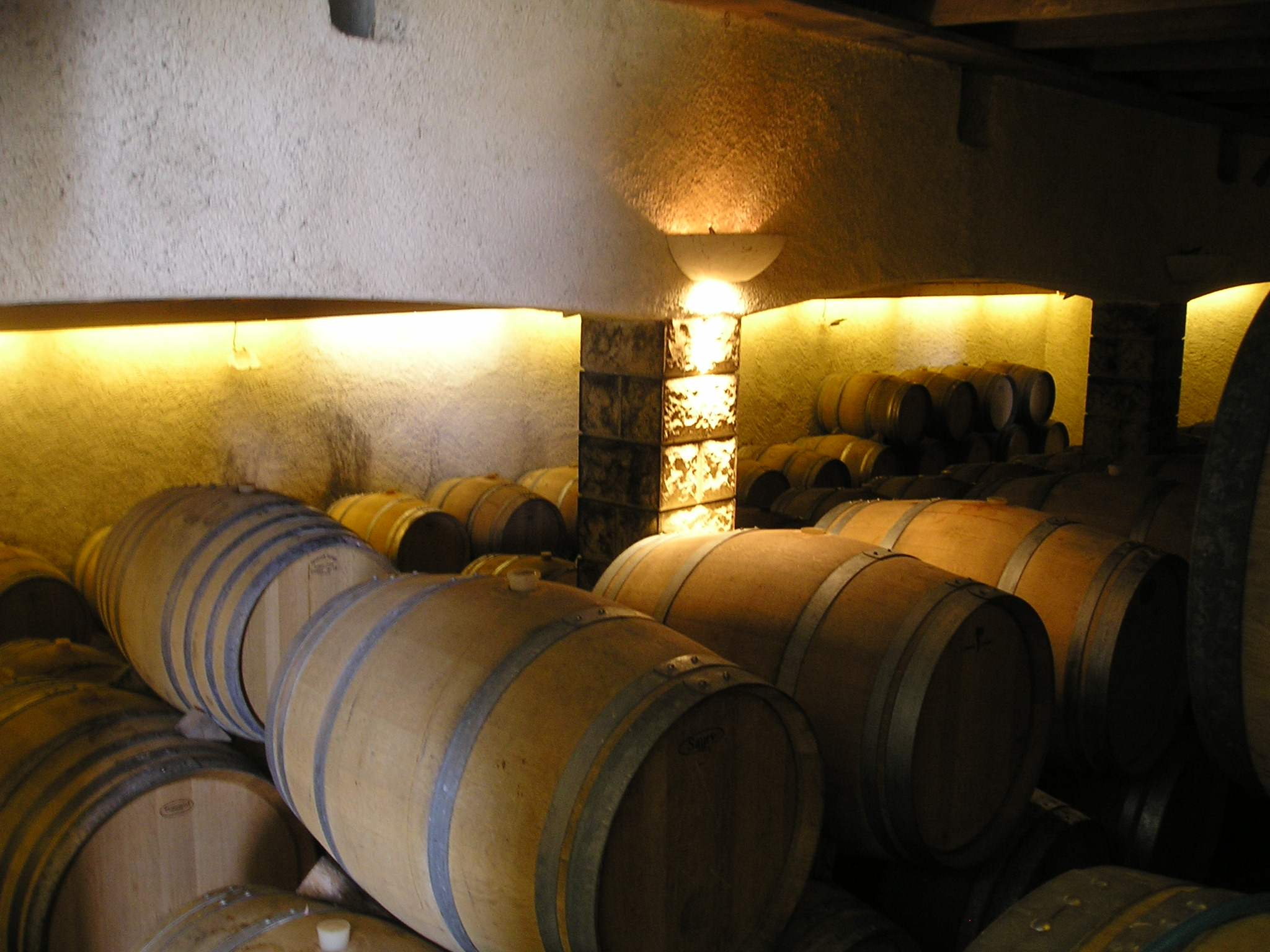 Barrell Room at Clos Lapeyre Jurançon. Chai de barriques au Clos Lapeyre à la Chapelle de Rousse, Jurançon.